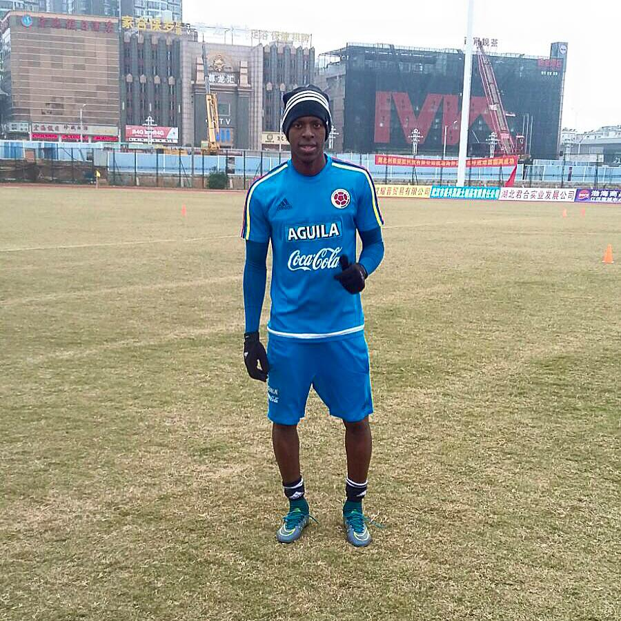 zurdo